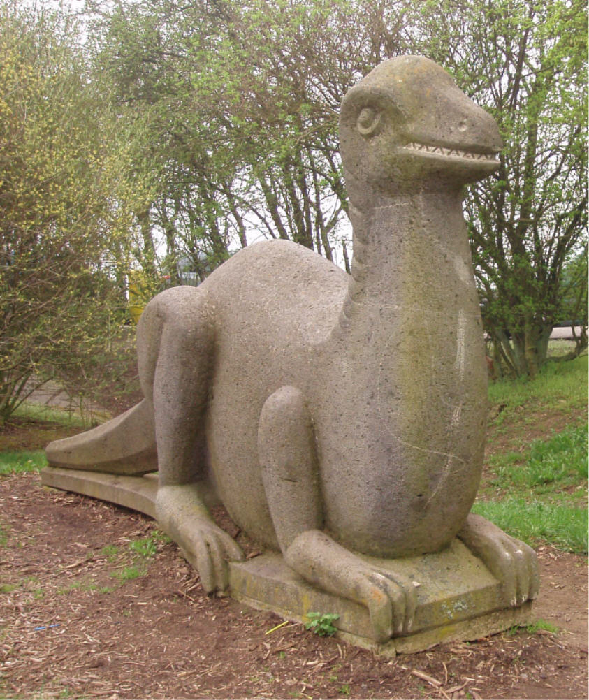 Nachbildung eines Iguanodons im Geogarten beim Bahnhof Engeln